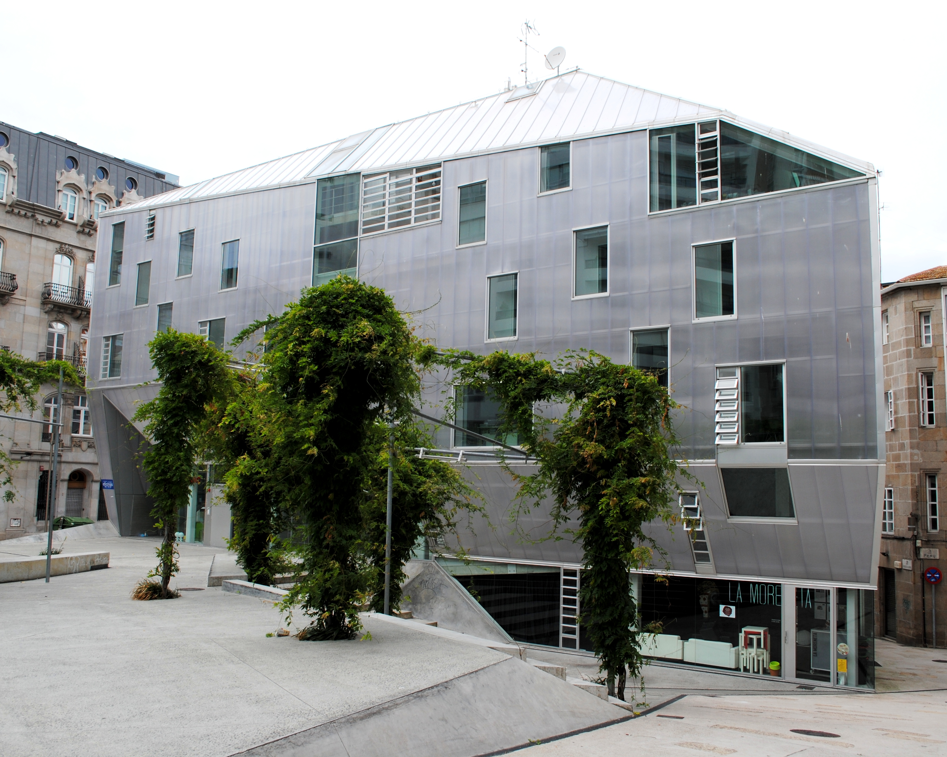 Sede do COAG en Vigo, obra dos arquitectos Jesús Irisarri e Guadalupe Piñera.